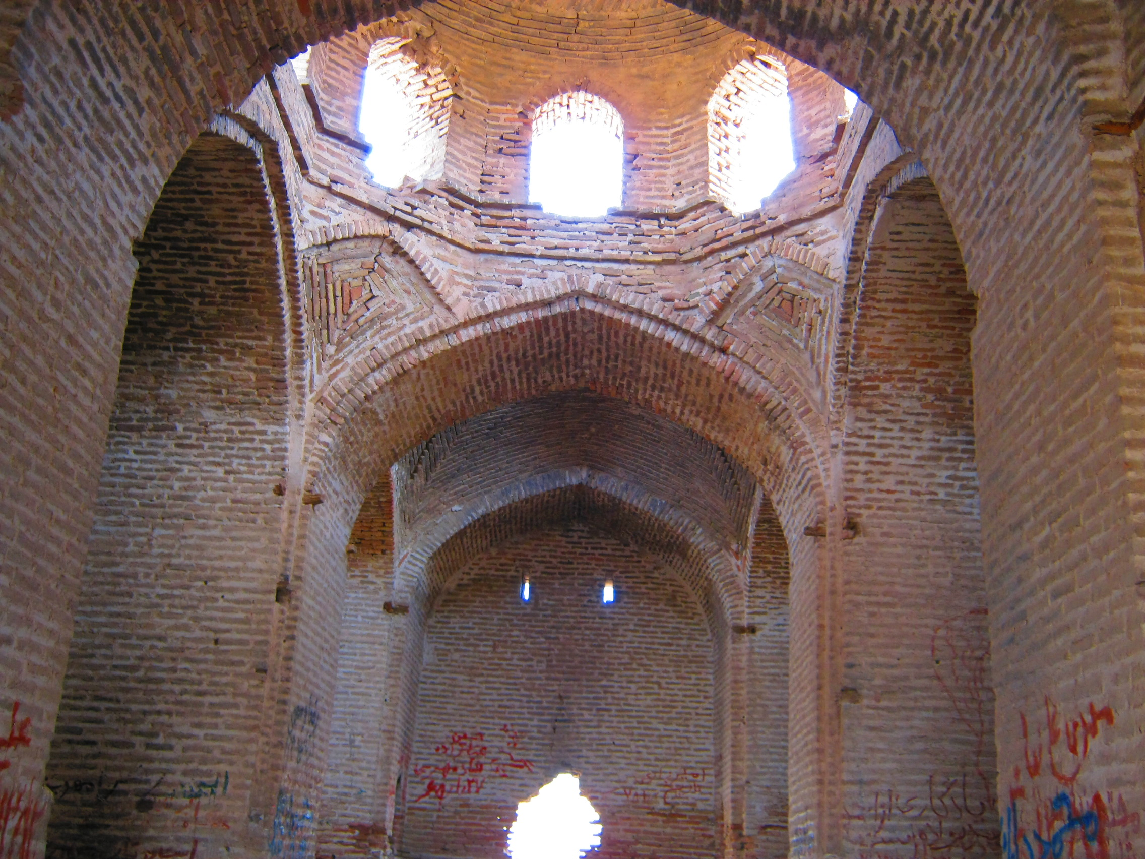 رباط زرنوخ